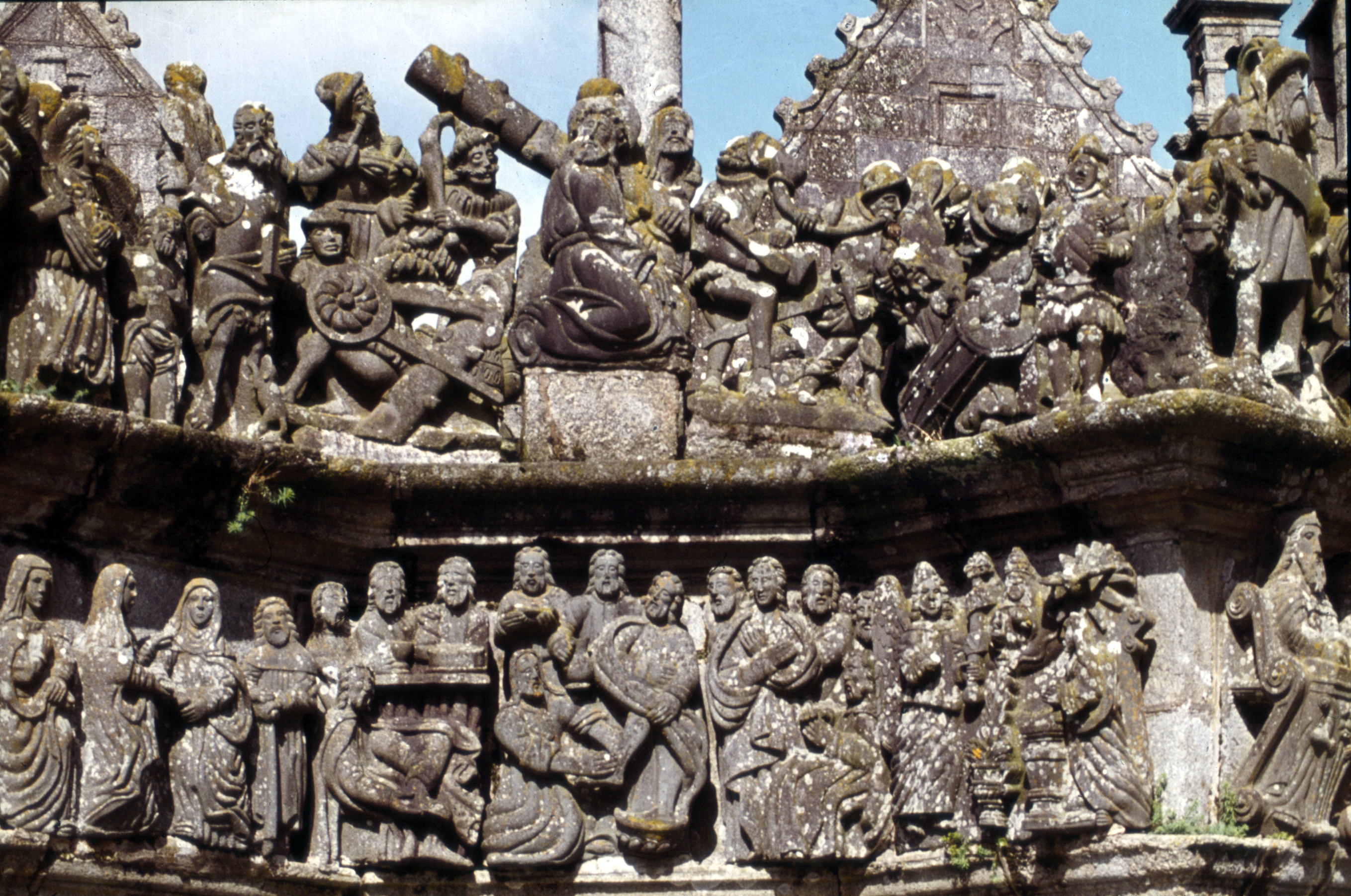 Guimiliau